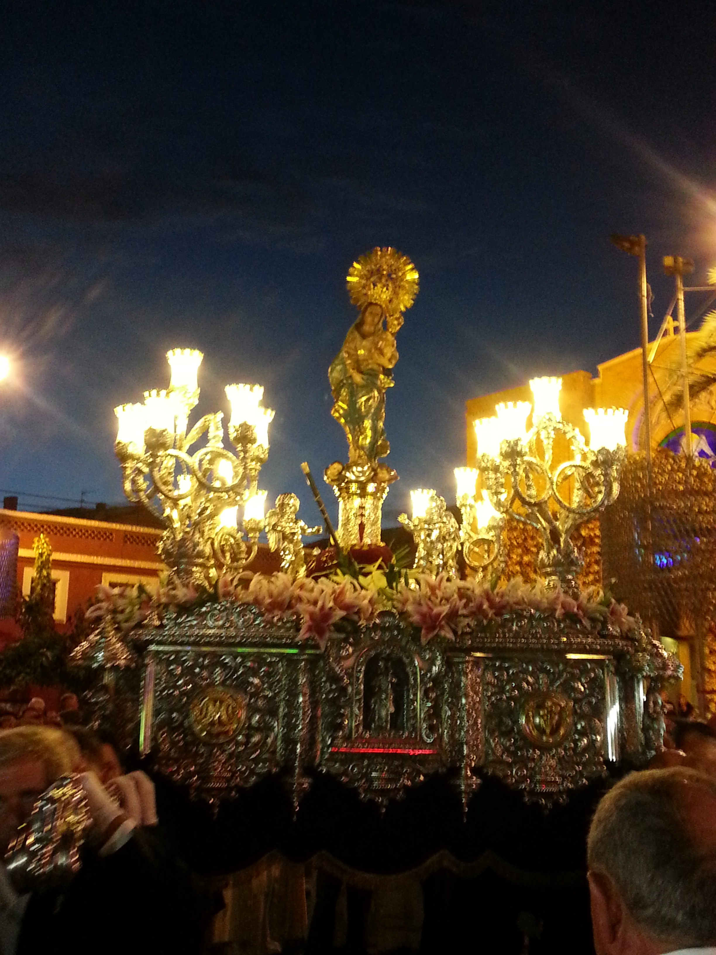 Procesión de Ntra Sra del Pilar 2014 - Pilar de la Horadada